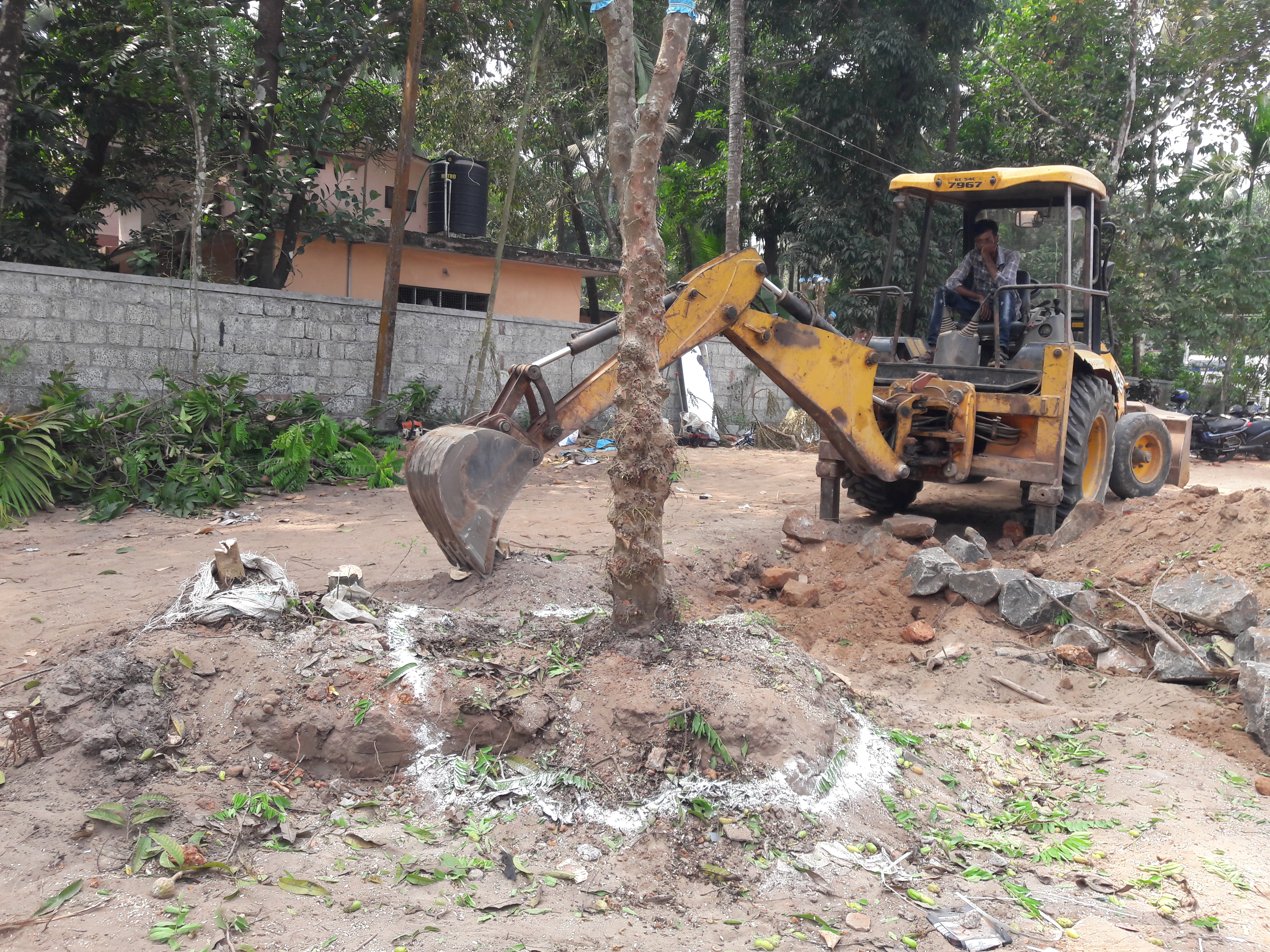 ഇരുമ്പാമ്പുളി മരം Bilimbi tree ശാസ്ത്രീയ നാമം Averrhoa bilimbi കുടുംബം Oxalidales പറിച്ച് നടുന്നു.